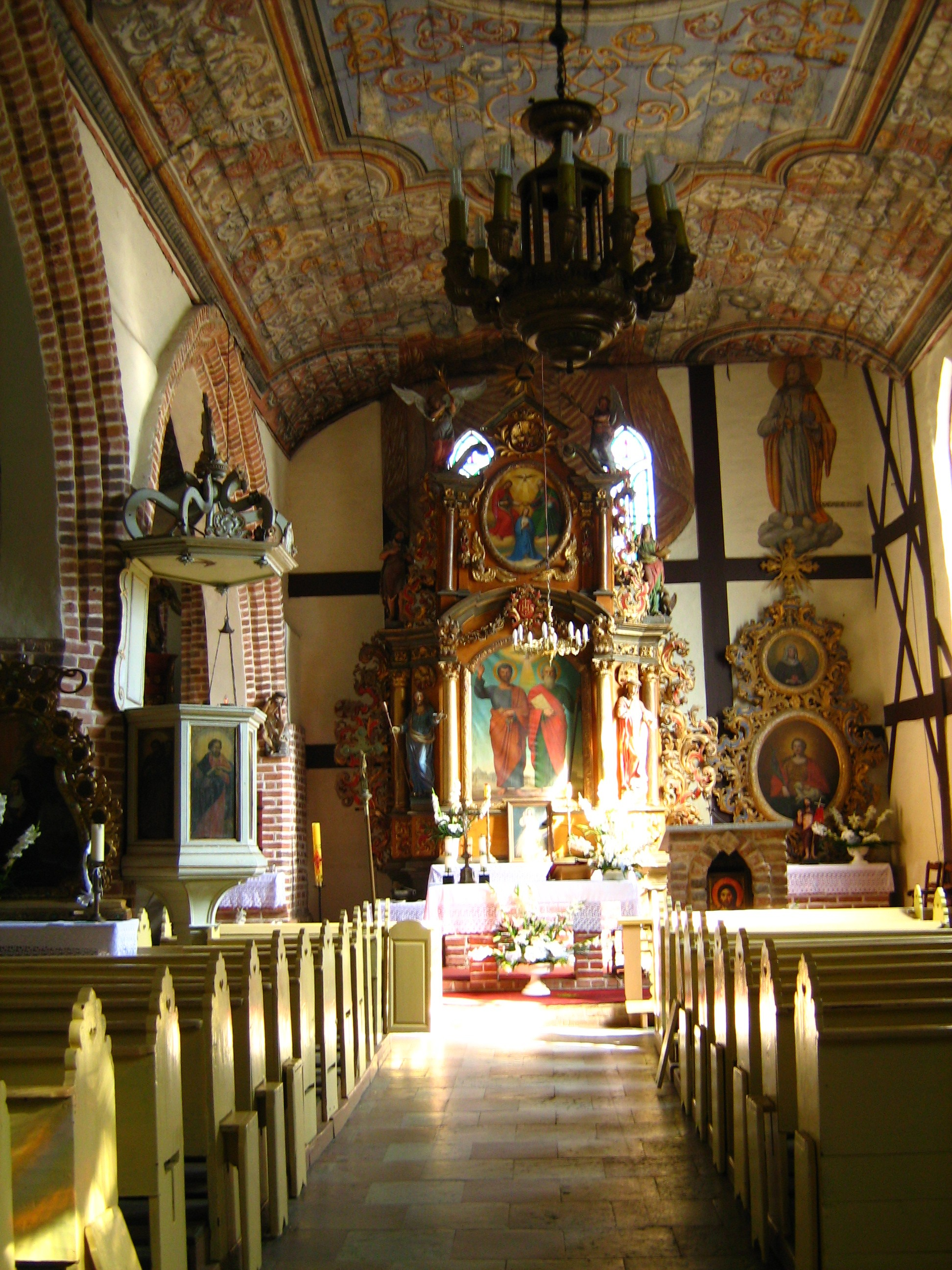 Gotycki kościół pod wezwaniem św. Piotra i Pawła. Zbudowany ok. 1340r. Widok wnętrza - barokowy, drewniany ołtarz główny (ściana wschodnia) z 1723 roku oraz dwa ołtarze boczne. Ołtarze posiadają bogatą dekorację rzeźbiarską. Mątowy Wielkie, Miłoradz